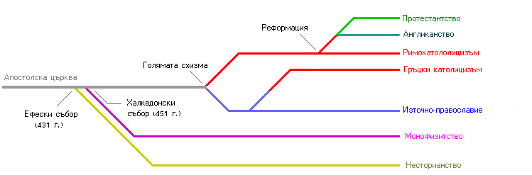 Историческо развитие на основните християнски течения